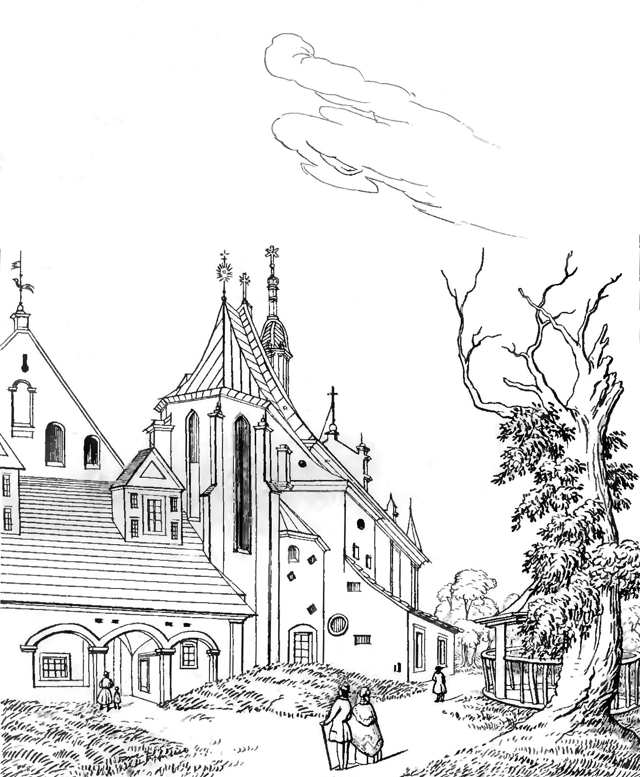 Ilustracja do książki „Tatry w dwudziestu czterech obrazach” (Macieja) Bogusza Zygmunta Stęczyńskiego. Oryginalny podpis: „Klasztór i kościół p.p. Klarysek w Starym Sączu”.